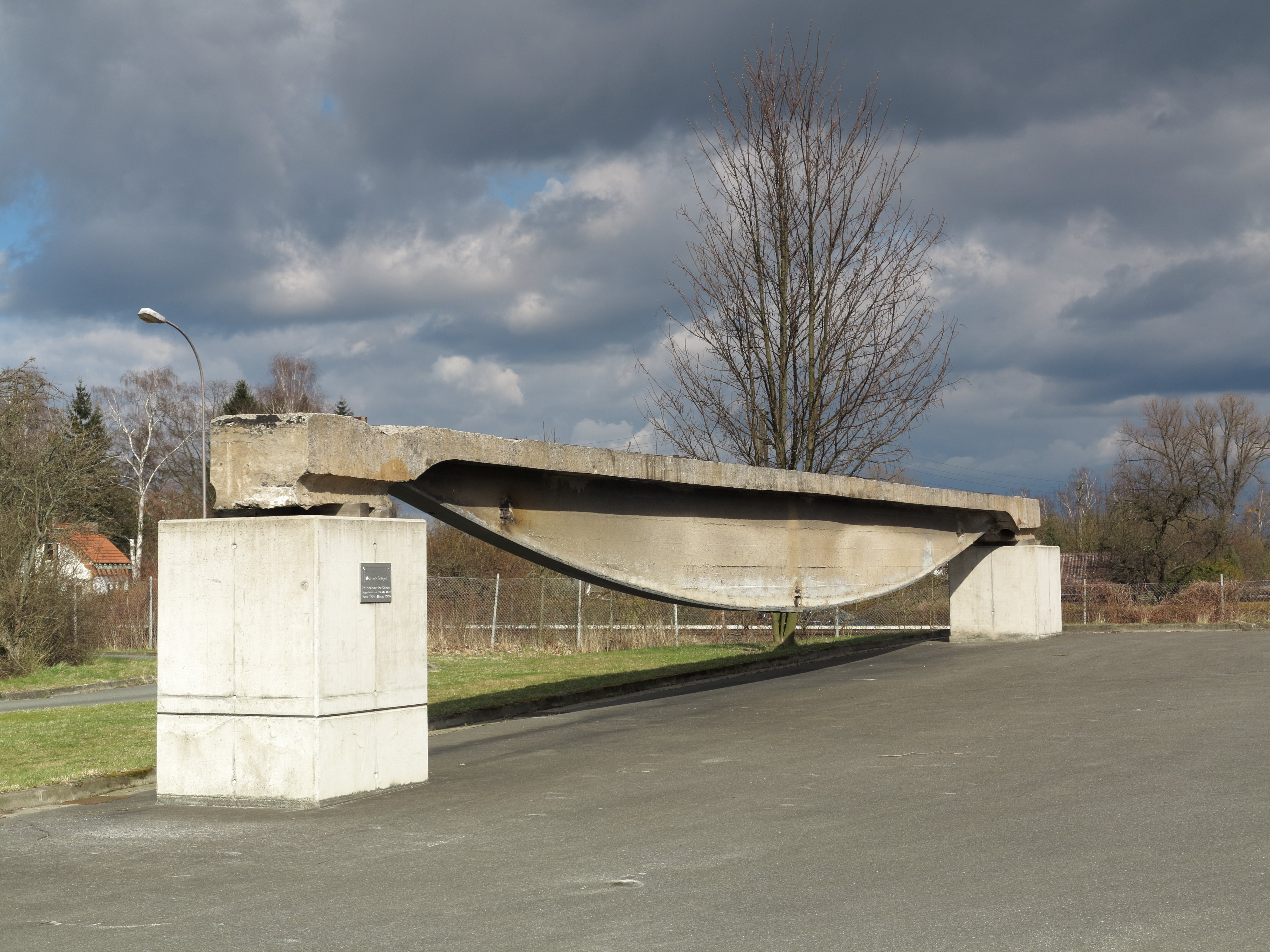 Hängegurt- oder Möller-Träger der Fallersleber-Tor-Brücke von 1904. Die Brücke wurde 2009 abgebrochen und durch eine neue ersetzt. Der Träger ist nun auf dem Campus Ost der TU Braunschweig in der Beethovenstraße ausgestellt.